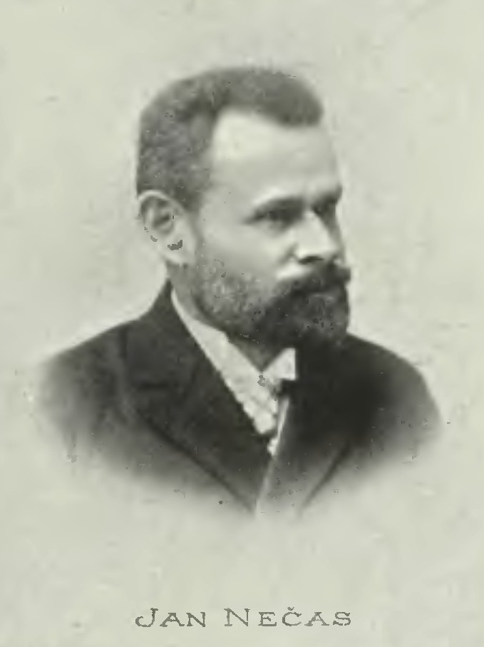 Portrét – Jan Evangelista Nečas (1849-1919), Český právník, soudce a básník.